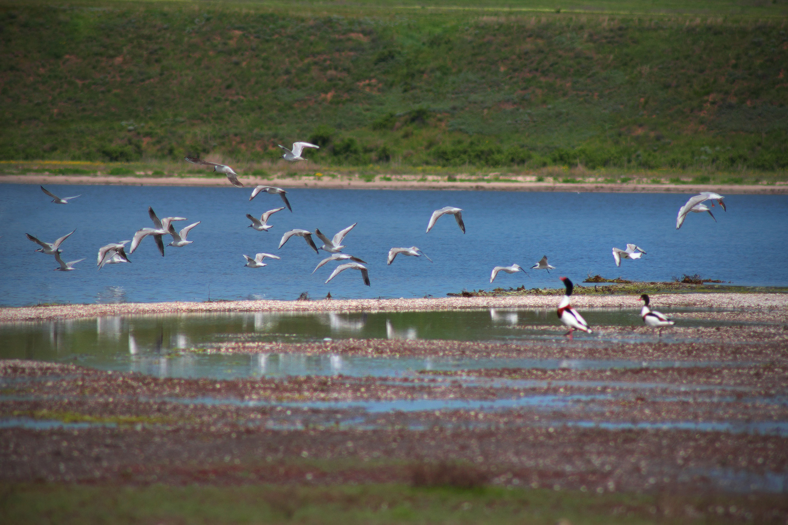 «Коса Стрілка», Комінтернівський р-н, біля с. Петрівка, Петровський державний аграрний технікум